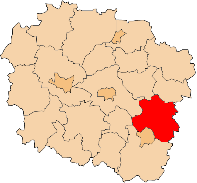 Powiat lipnowski na mapie województwa kujawsko-pomorskiego.